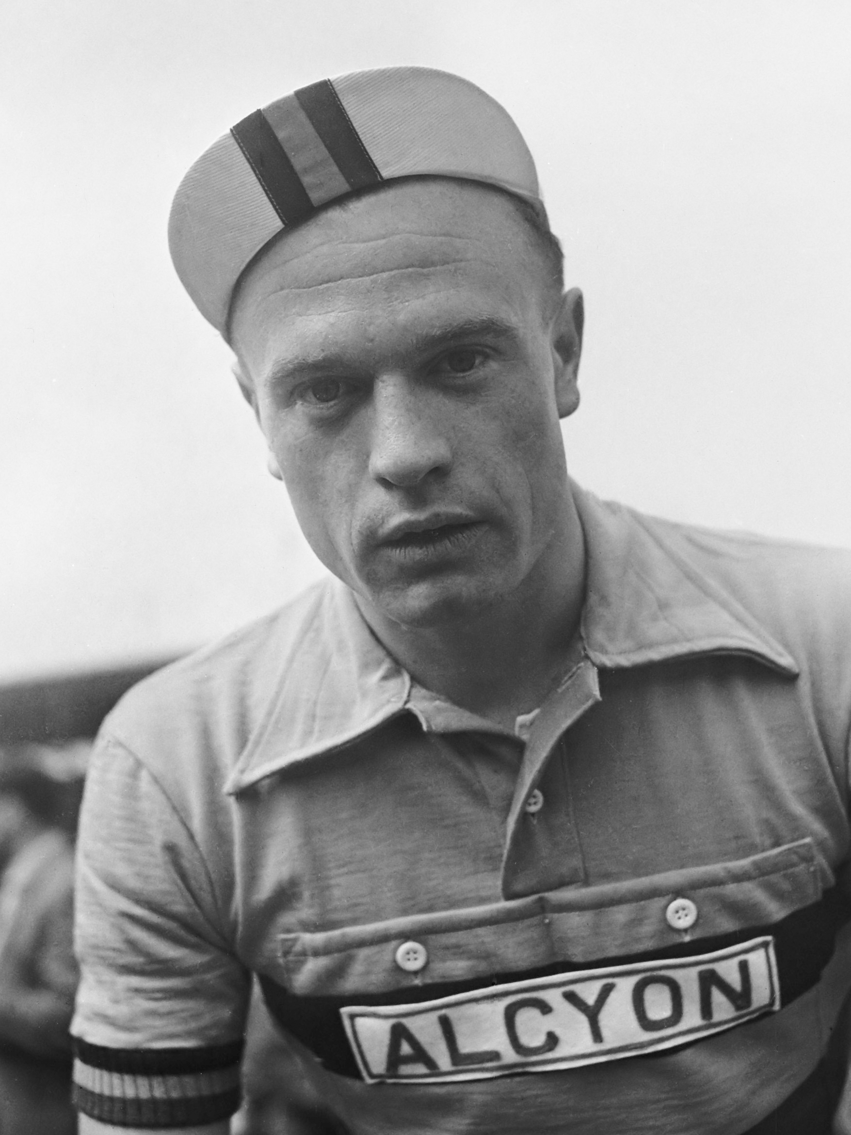 Koppen deelnemers Tour de France , Derijcke (Belgie) 12 juli 1954